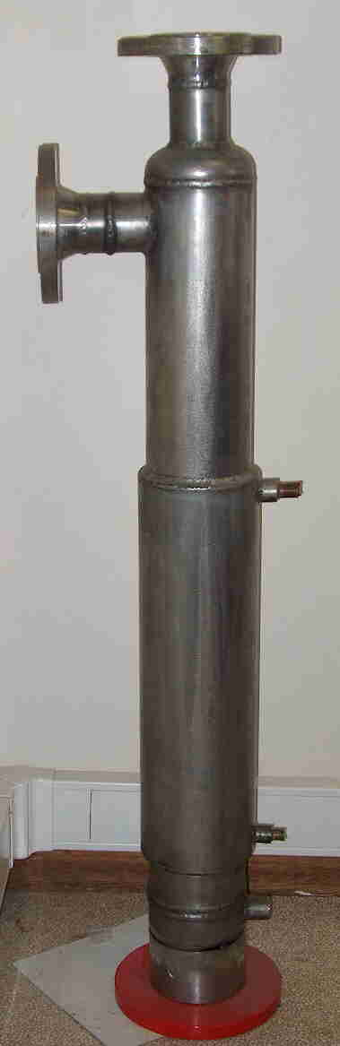 Colonne de Bouhy haute pression, inox, cliché Drytec.